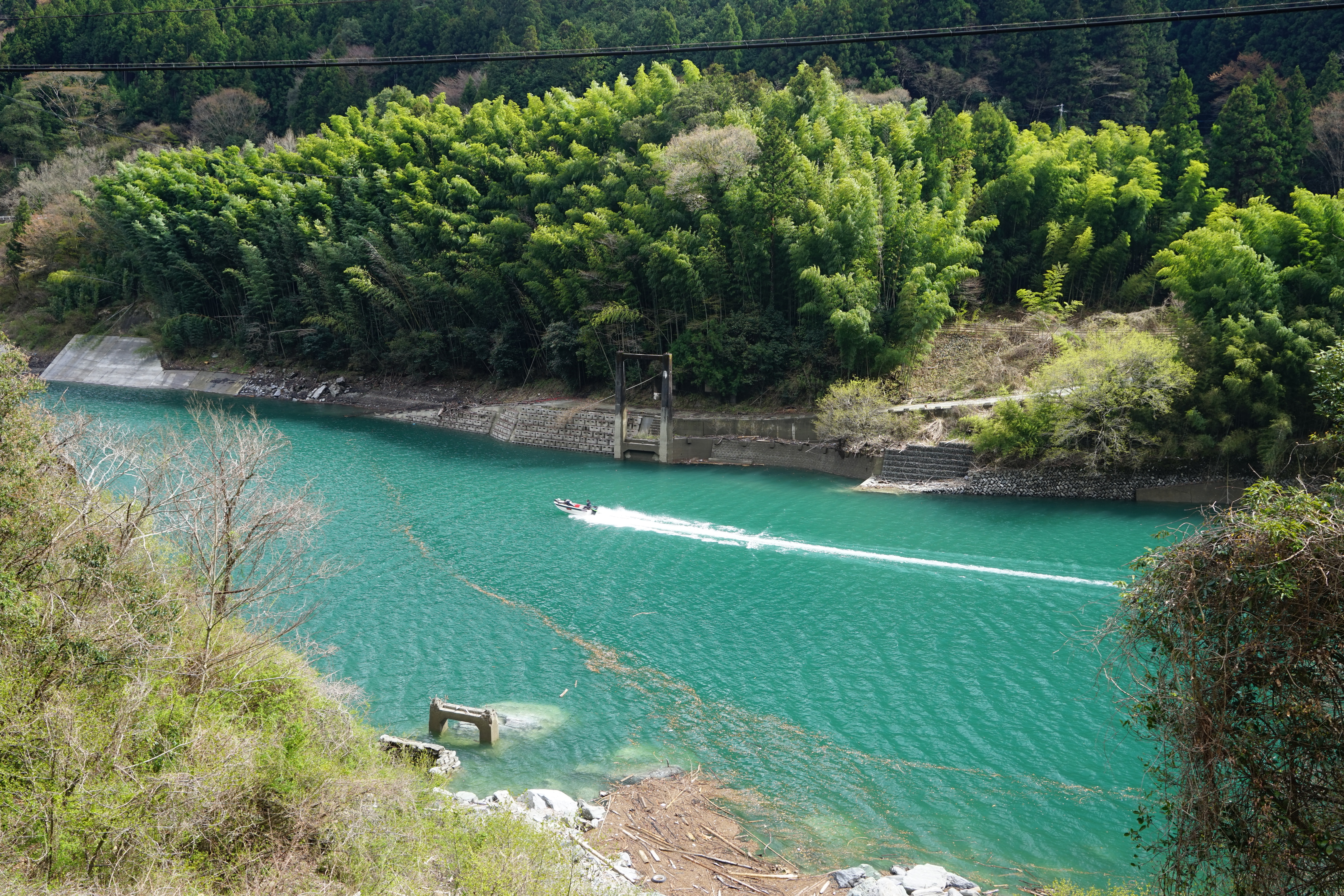 Kawasaki, Okawa, Tosa District, Kochi Prefecture 781-3712, Japan